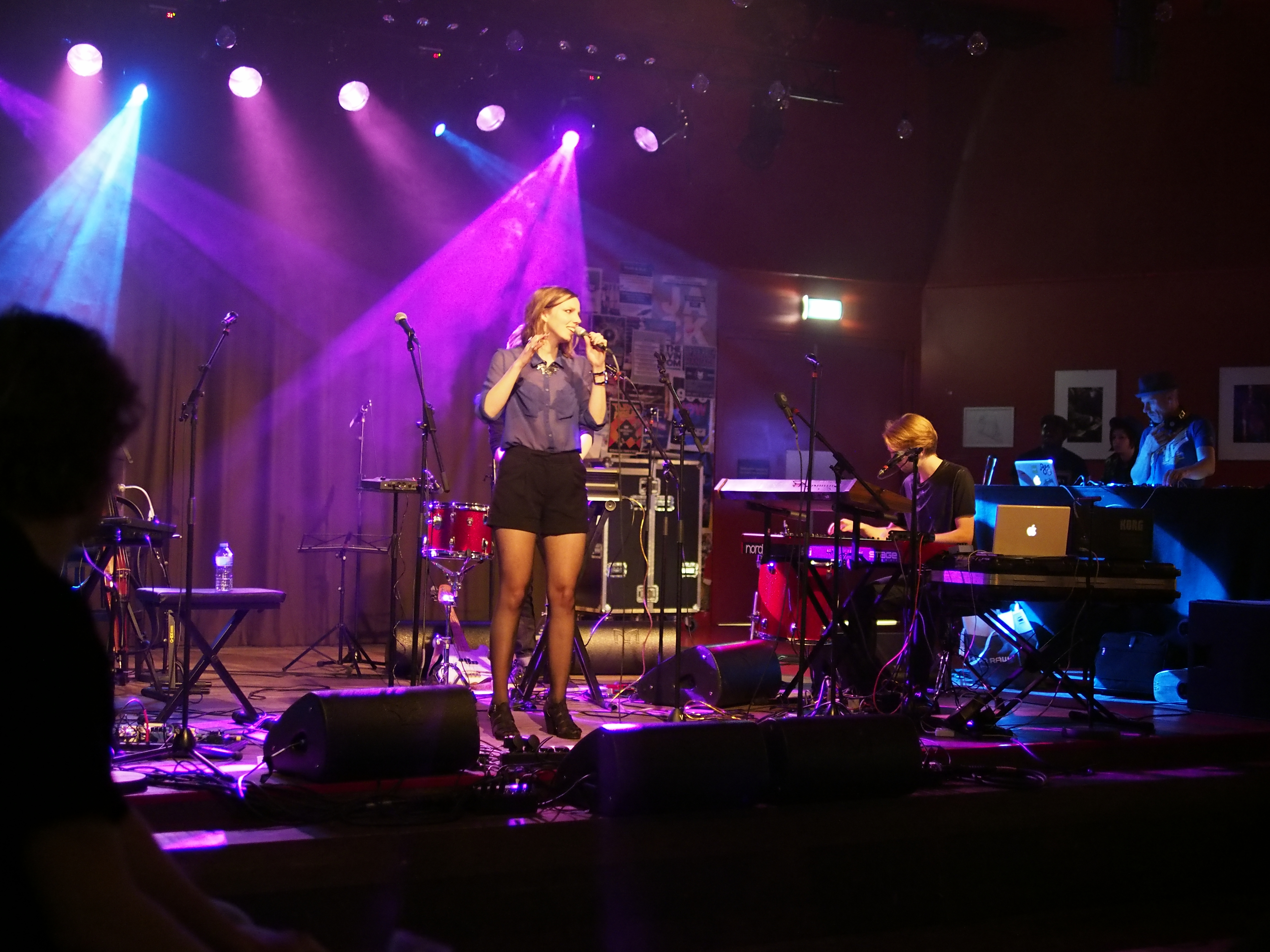 Kris Berry & Perquisite voorprogramma: Rita Zipora